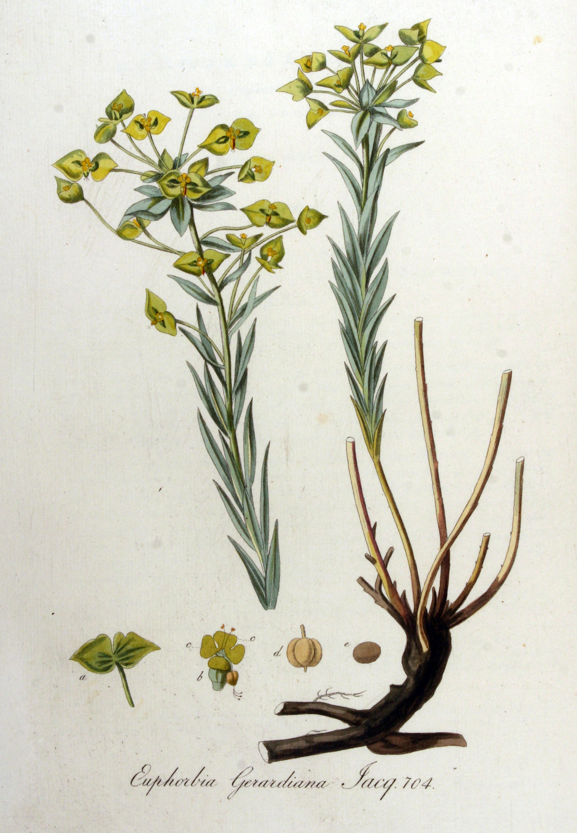 Euphorbia seguieriana Neck. (Syn. Euphorbia gerardiana Jacq.)